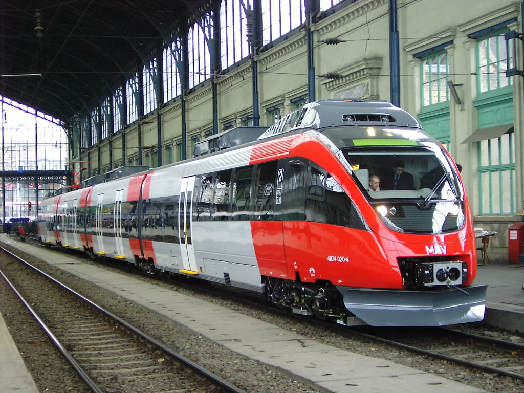 Ein MÀV Talent der Reihe 5342 im Bahnhof Budapest Nyugati (Westbahnhof). Dieses Fahrzeug wurde direkt aus der ÖBB Reihe 4124 abgeleitet und trägt sowohl noch die alte ÖBB Lackierung, als auch die ÖBB Triebfahrzeugnummer